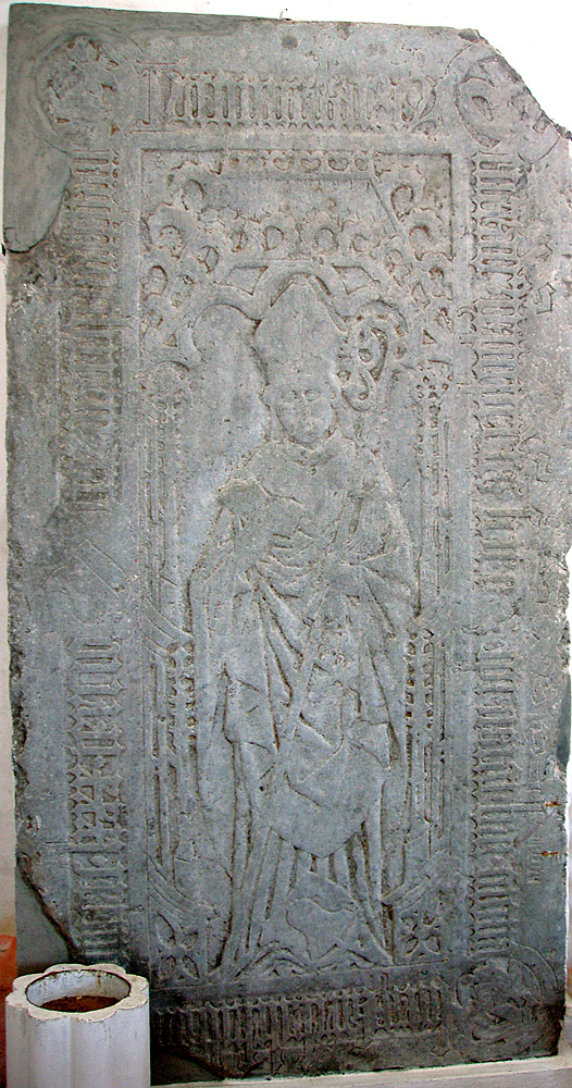 Biskop Svends ligsten i Sankt Sørens Kirke i Gammel Rye, Århus Amt, Jylland, Denmark. Image by: user:Nico-dk / Nils Jepsen